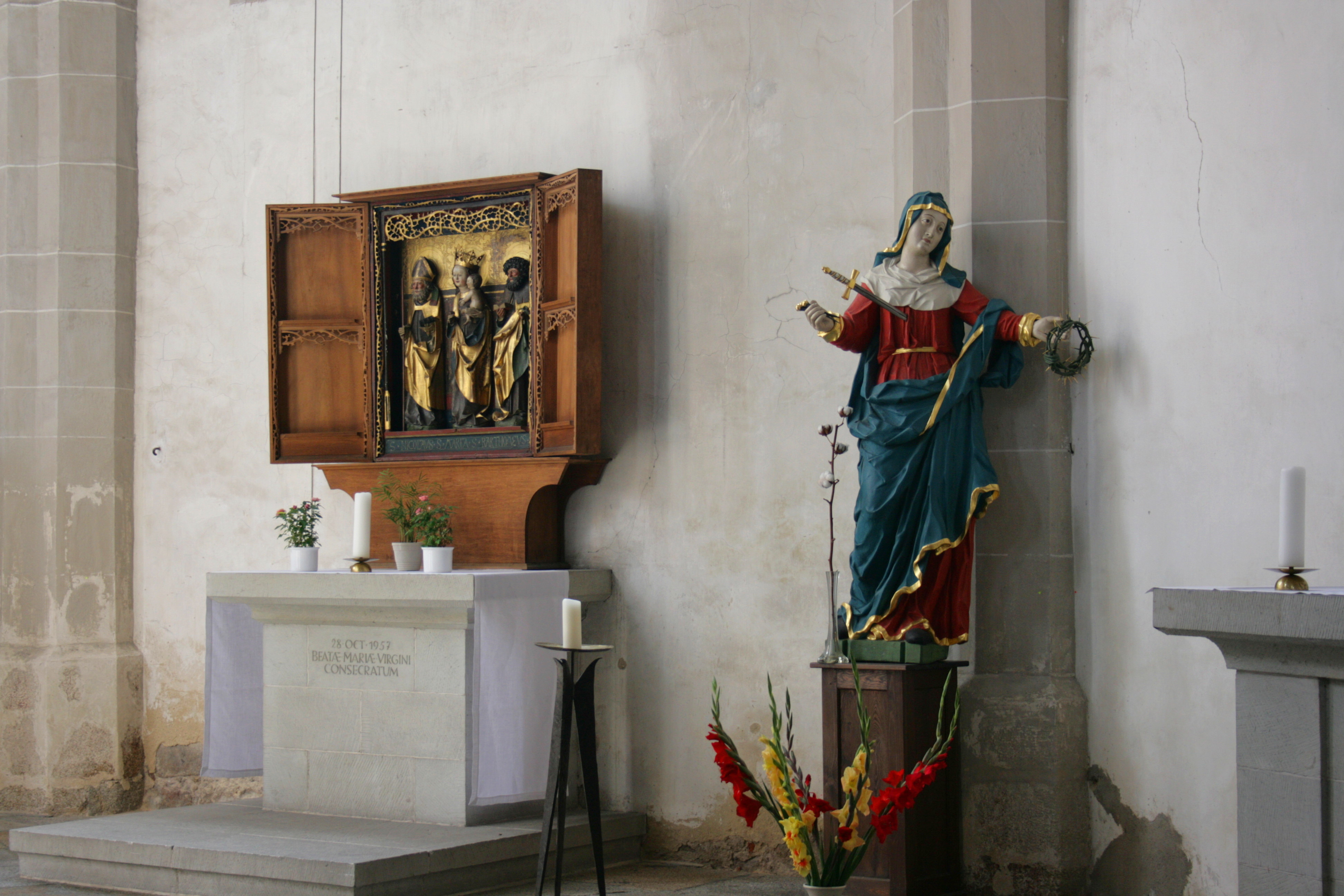 Dom St. Petri in Bautzen, katholischer Teil Hornjoserbsce: Tachantska cyrkej swj. Pětra w Budyšinje; katolski dźěl.